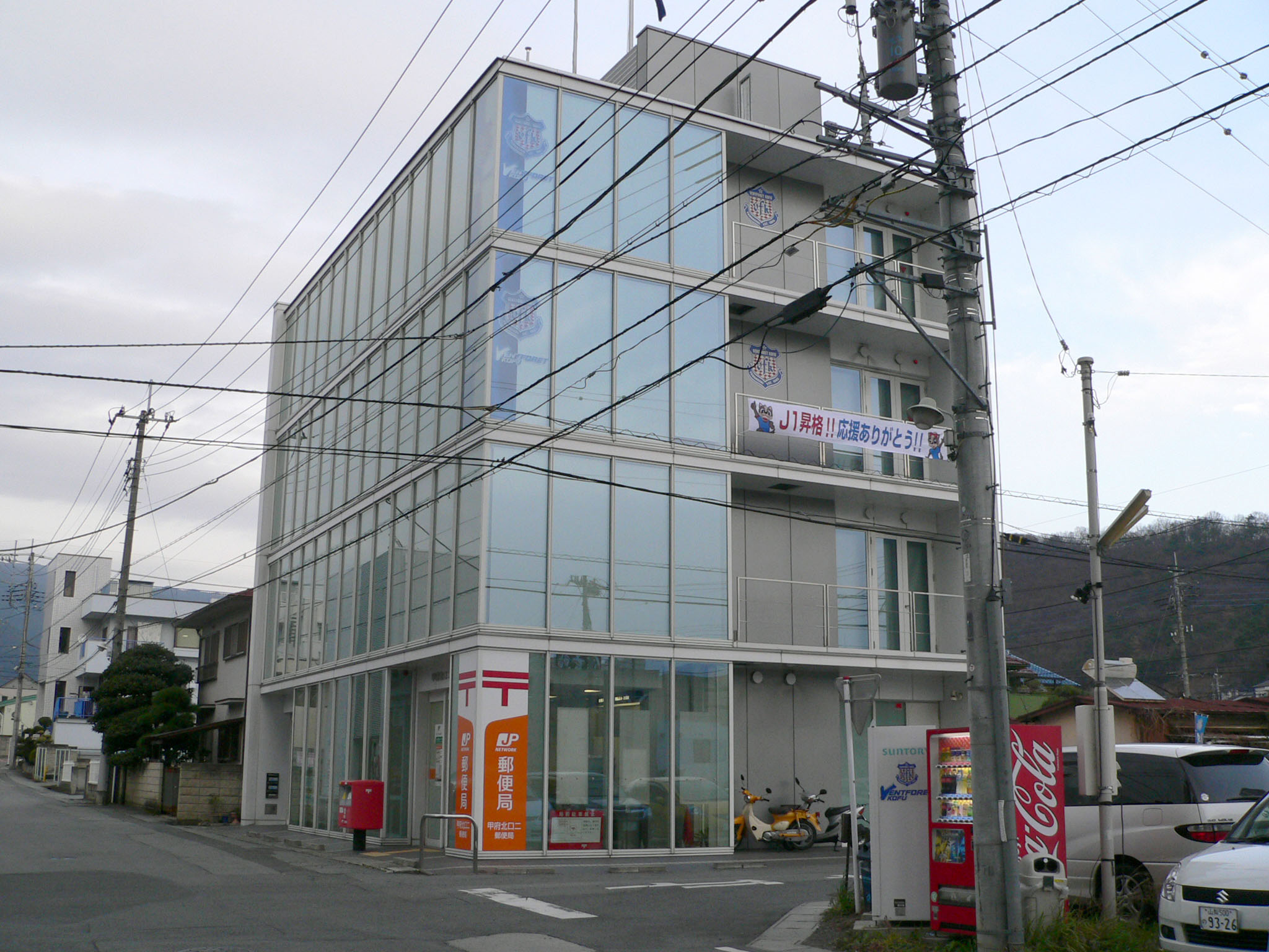 ヴァンフォーレ山梨スポーツクラブ事務所（3階および4階）